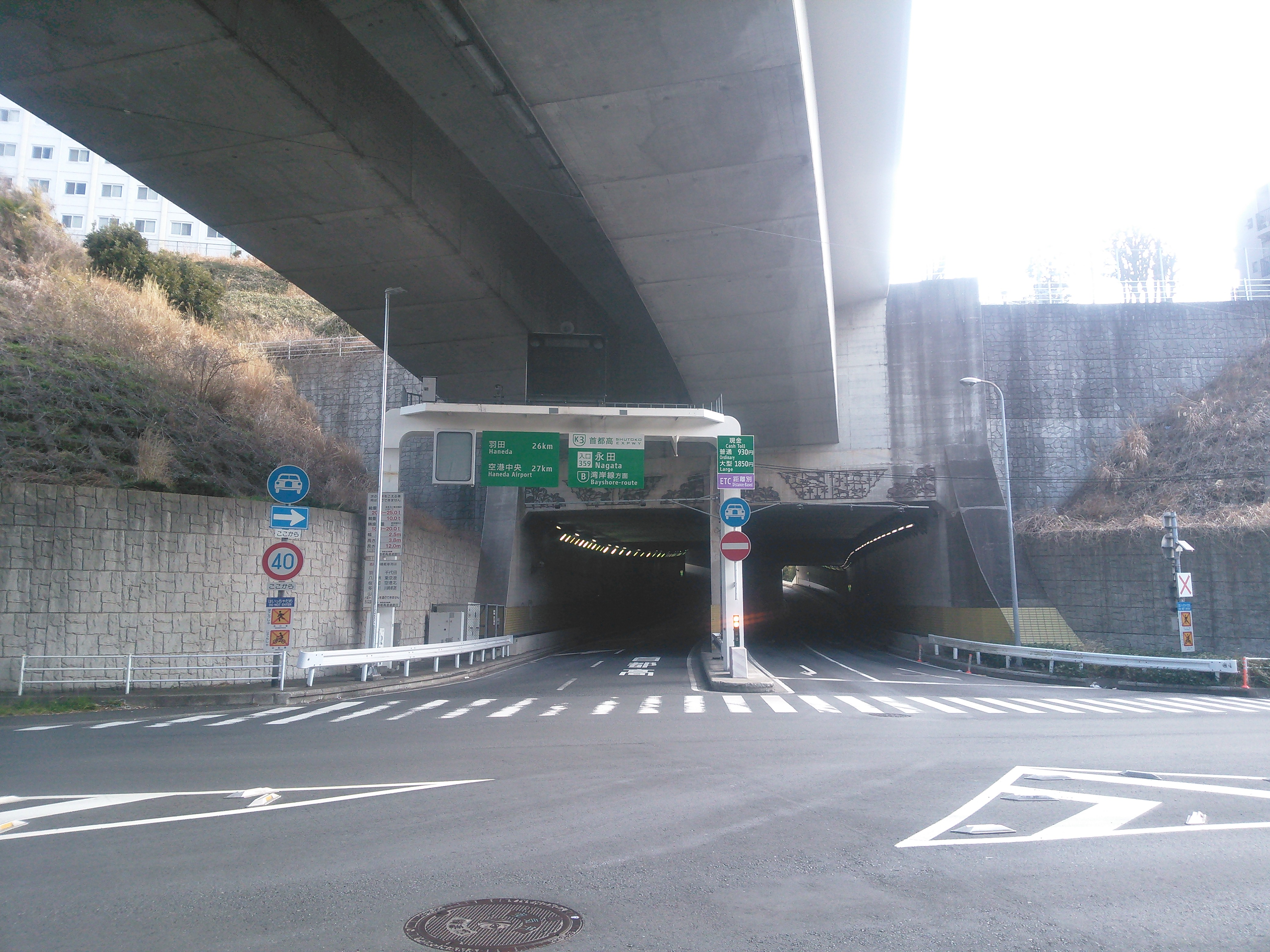 首都高狩場線、永田入口